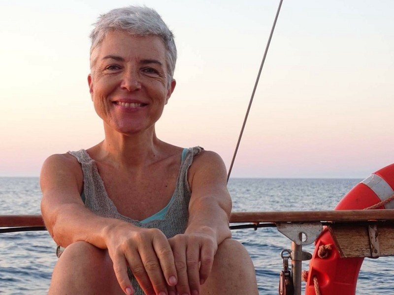 Martha Zein, navegando por la costa griega, julio 2016